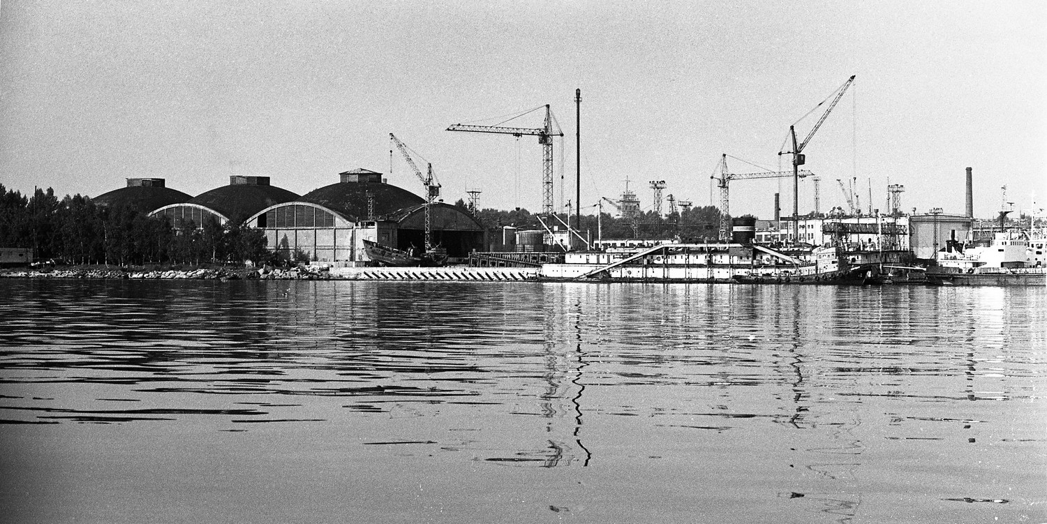 Lennusadam 88 (02)